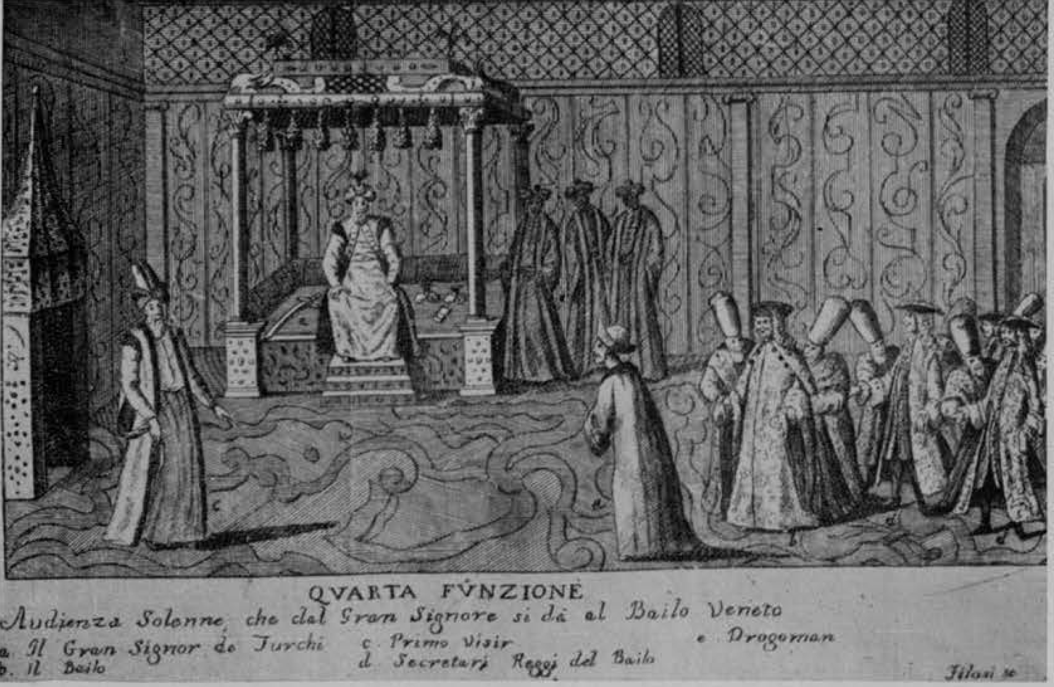 Vizita a bailo Soranzo a sultan